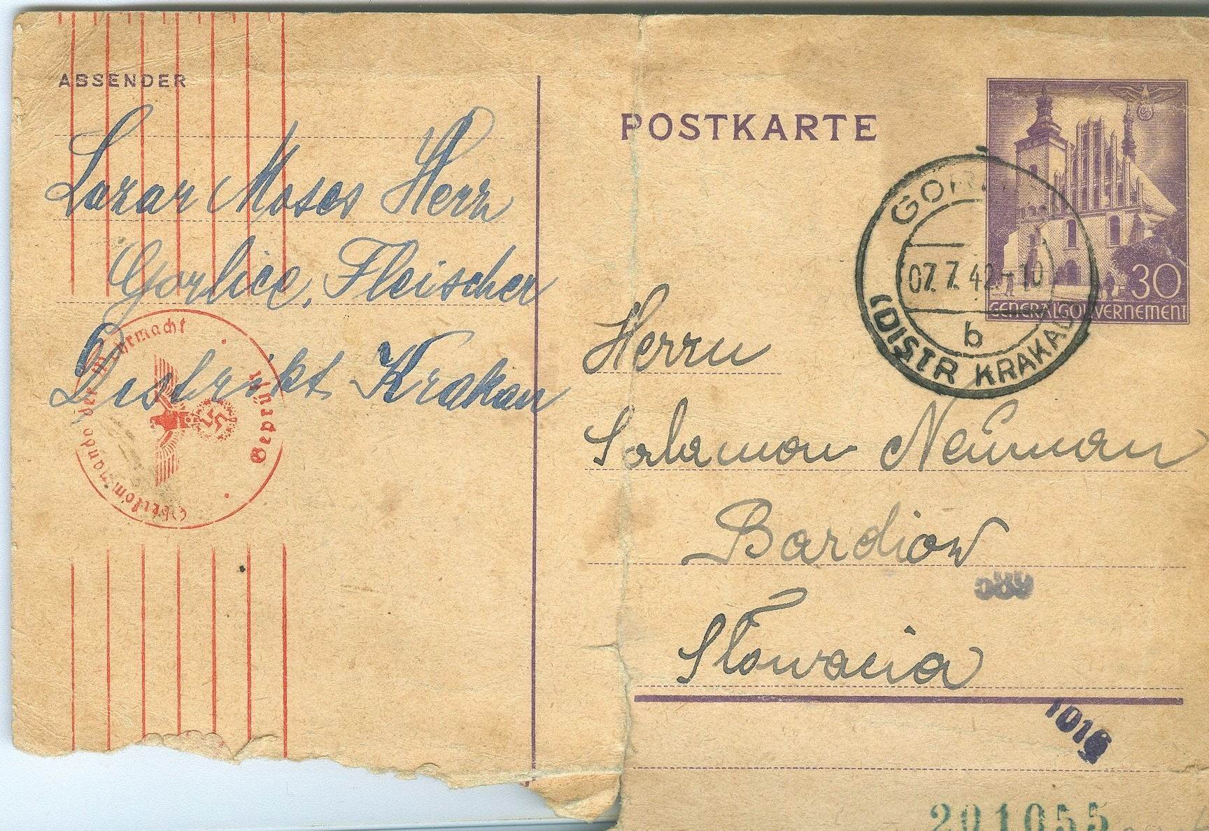 גלויה שנשלחה מגטו גורליצה ביולי 1942